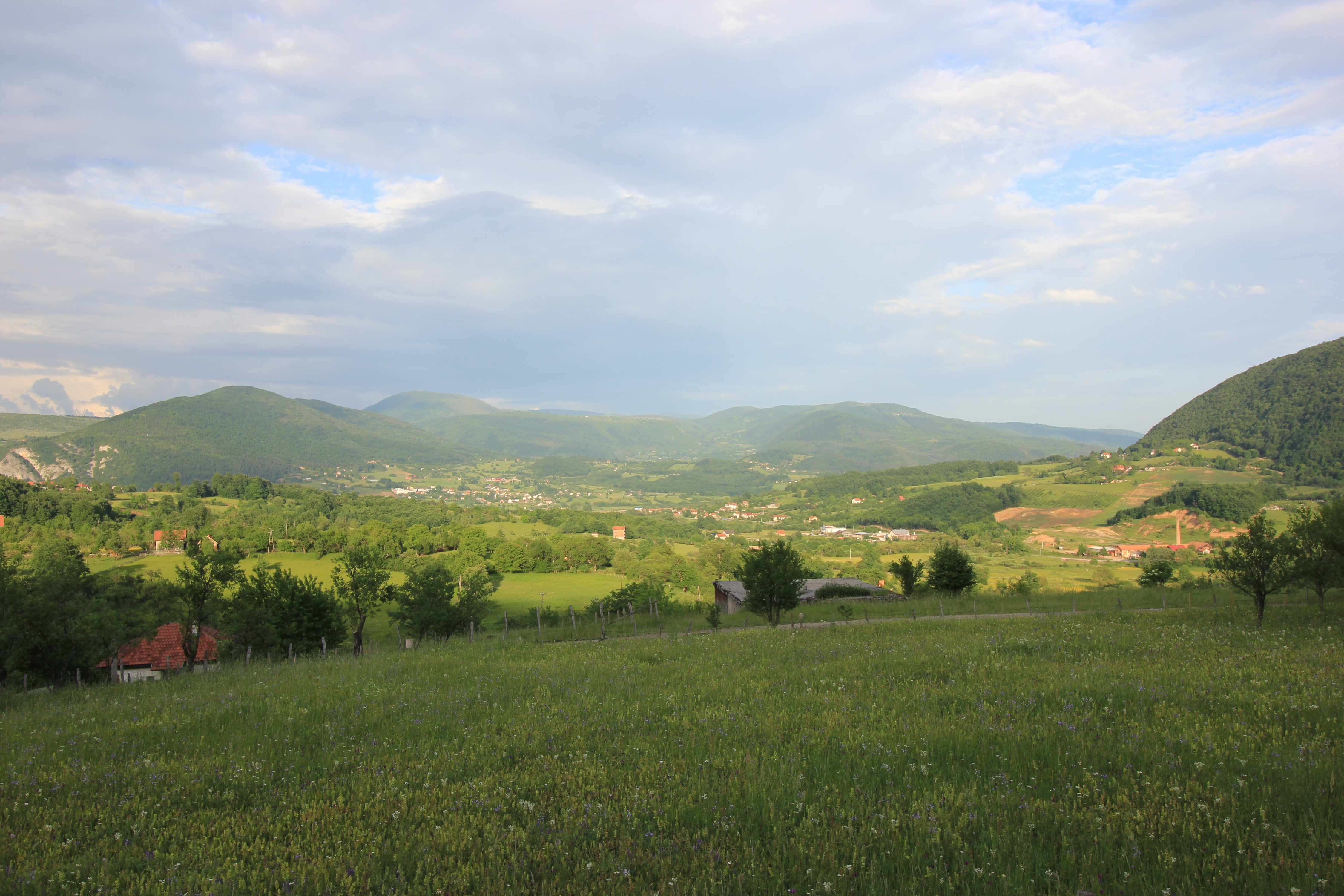 Bosnische Landschaft nördlich von Rogatica